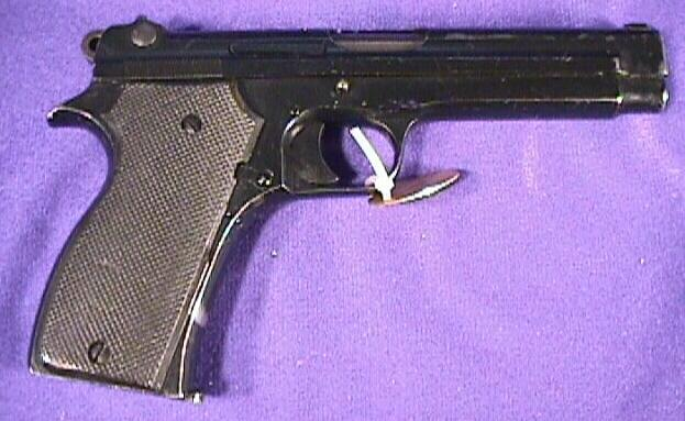 Modèle 1935A pistol